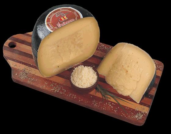 Sardo cheese